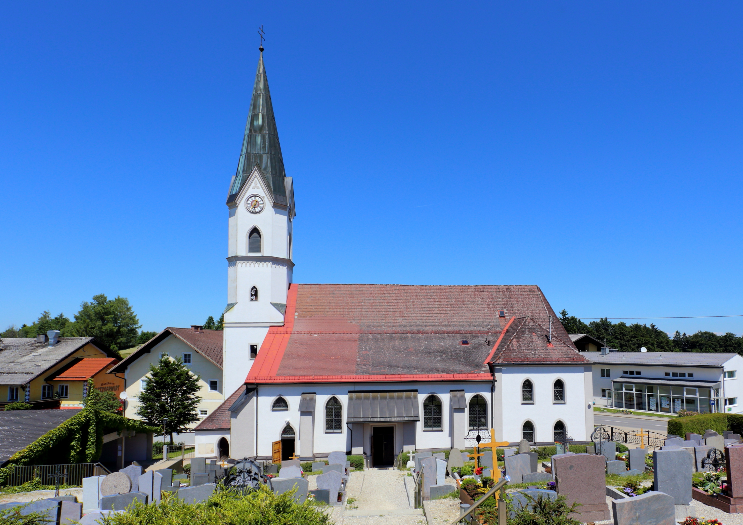 Südansicht der katholischen Pfarrkirche hl. Johannes der Täufer in der oberösterreichischen Gemeinde St. Johann am Walde. Ein gotischer Bau bei dem 1852 das Langhaus um zwei Joche erweitert und der 37 m hohe Westturm errichtet wurde. 1903 wurde im Süden ein Seitenschiff mit fünf Jochen angebaut.